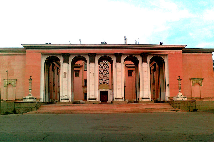 Старое здание у парка Металлургов (г. Шымкент).